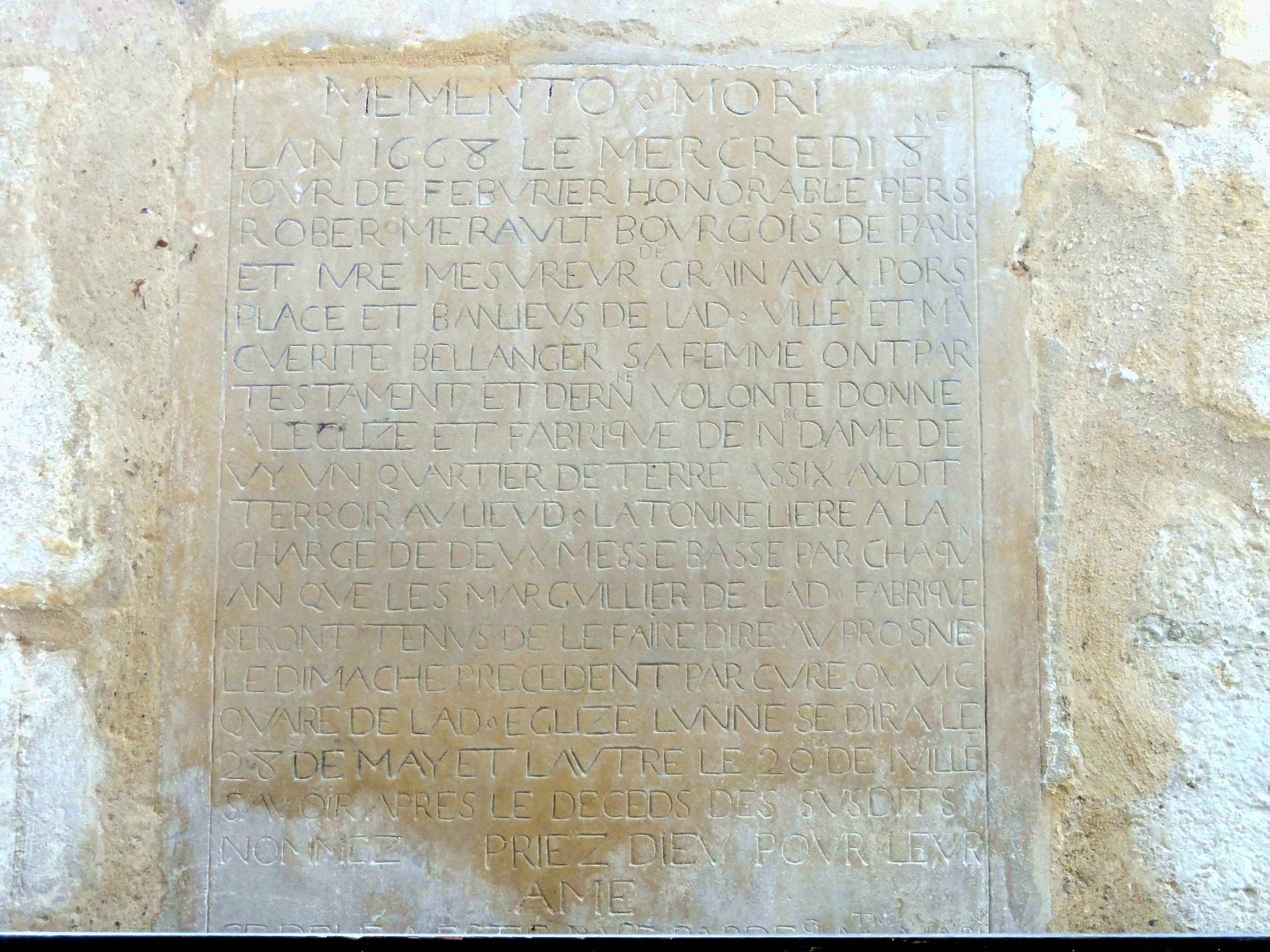 Mobilier de l'église (voir titre).